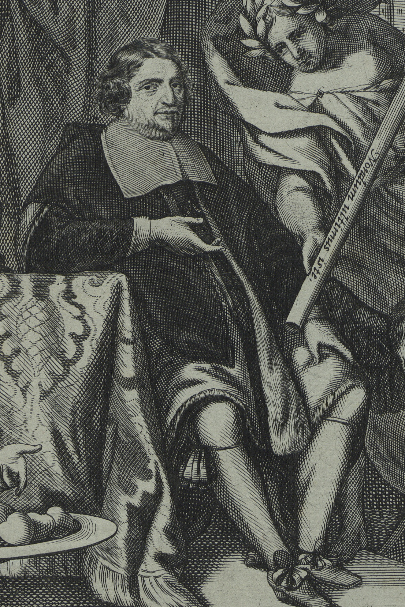 Auszug aus einem Gedenkblatt auf den Regierungsantritt des Bürgermeisters Franz Brassart 1669, 1598-1671; Kölner Ratsherr und Bürgermeister